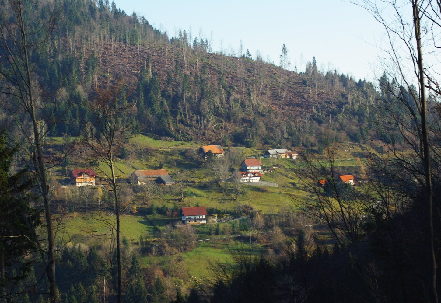 PogledNaPodlom1